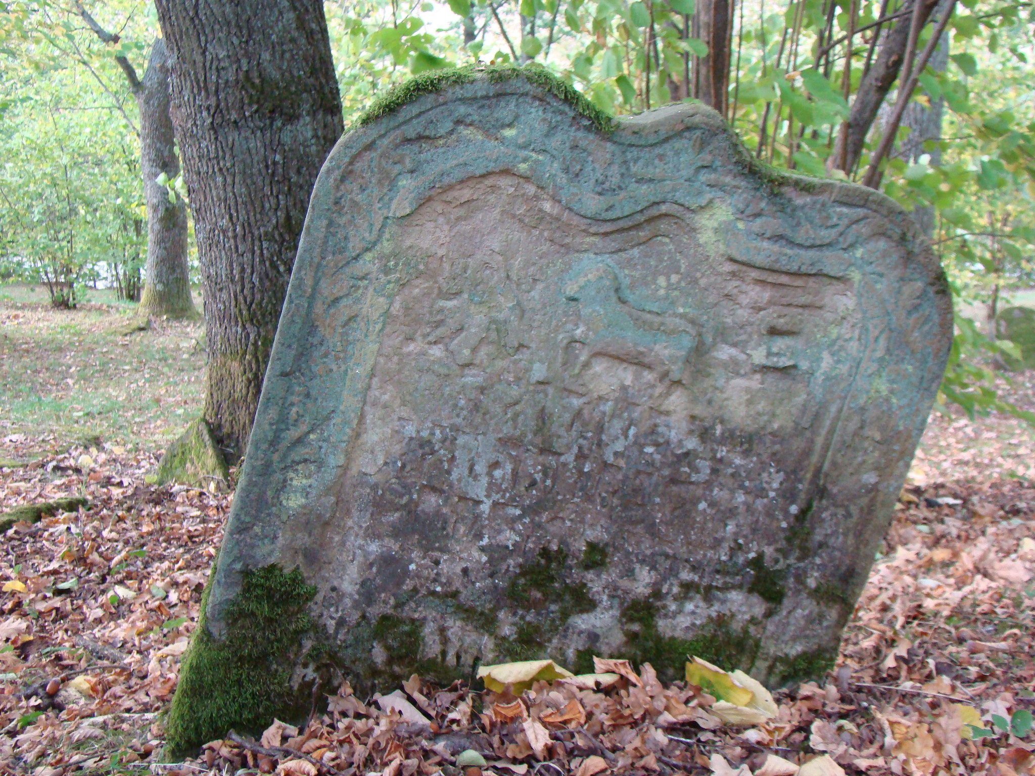 Jüdischer Friedhof in Obersulm-Affaltrach. Grabmal für Rabbi Ascher Laemmle aus Lehrensteinsfeld